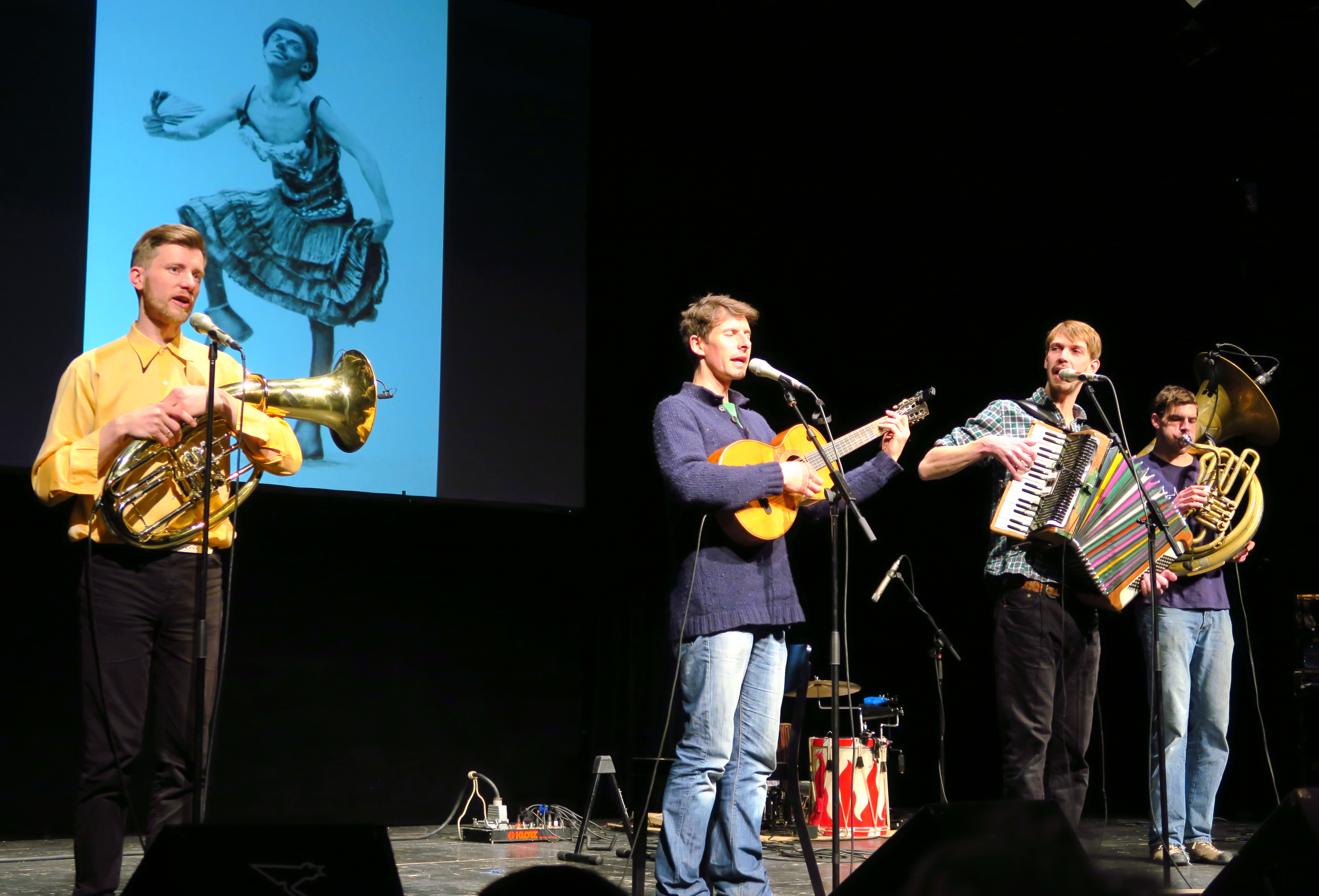 Kofelgschroa bei der Verleihung des "Großen Karl-Valentin-Preises" an den Kabarettisten Sigi Zimmerschied am 19. März 2017 im Münchner Volkstheater